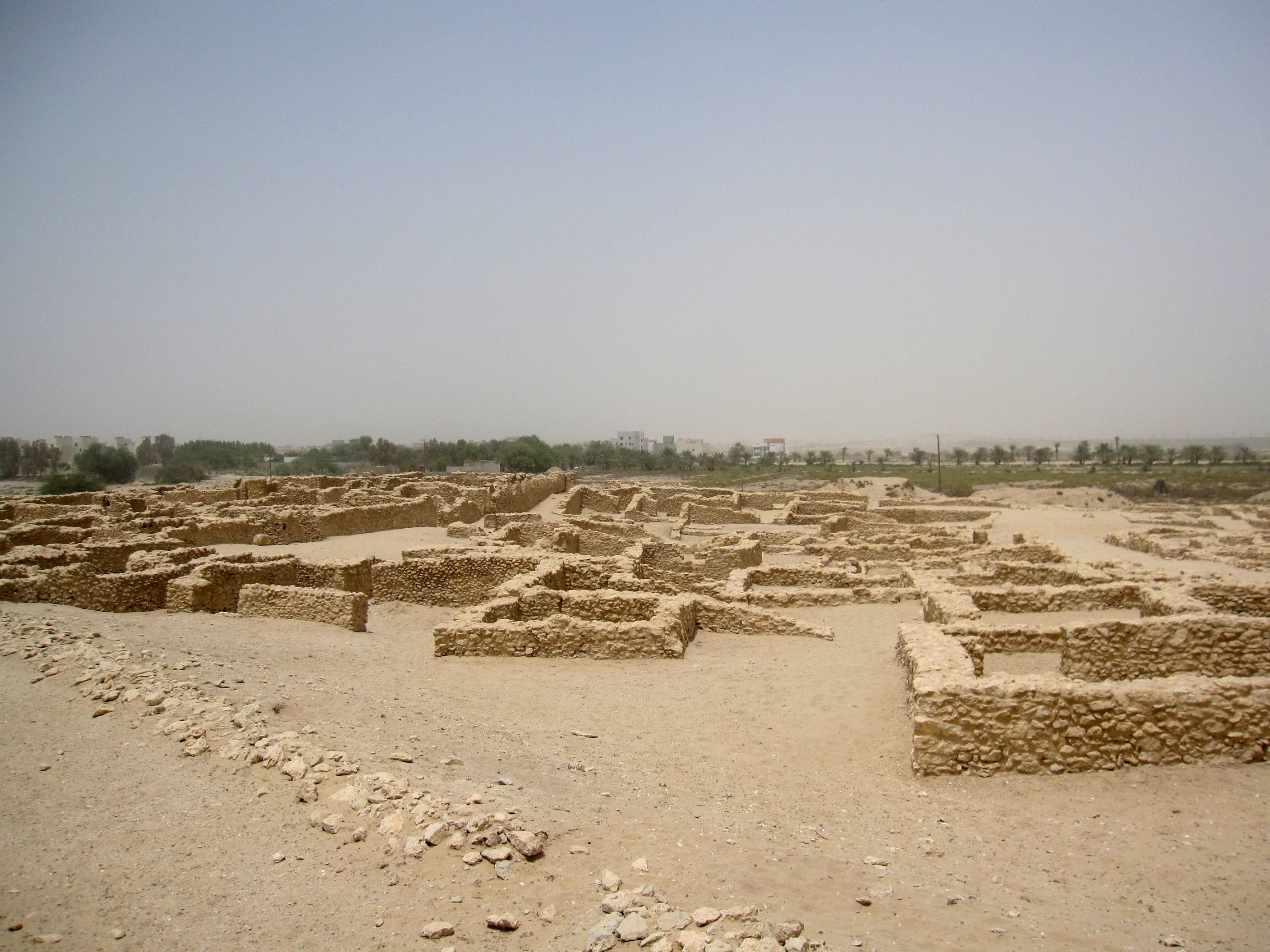 Dilmun period (3200-320 BC) burial chambers at Sur